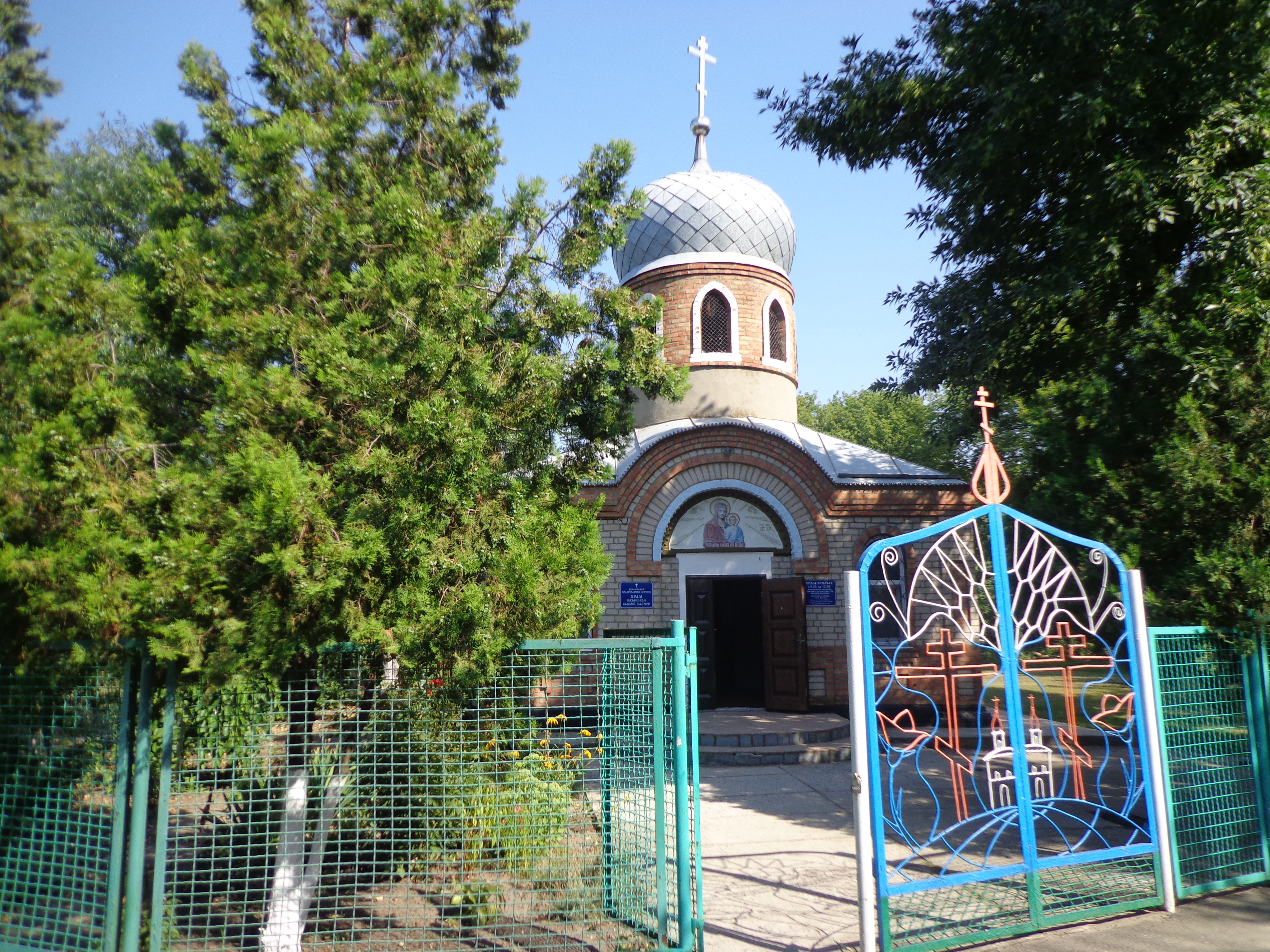 Церковь. Село Константиновка, Мелитопольский район, Запорожская область, Украина.